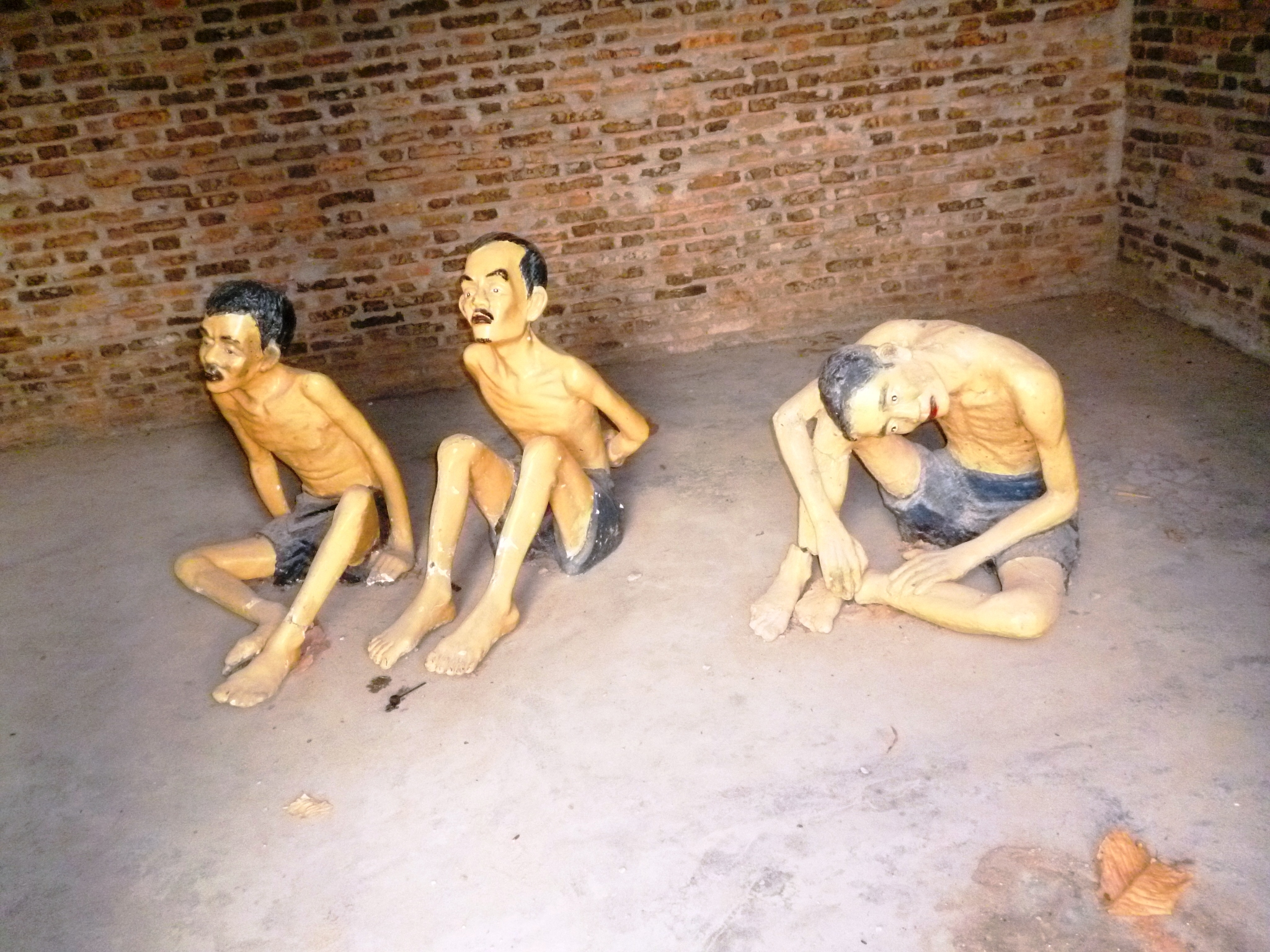 Hình chụp phục dựng tù nhân nhà tù Phú Lợi (chụp bằng máy ảnh cá nhân)